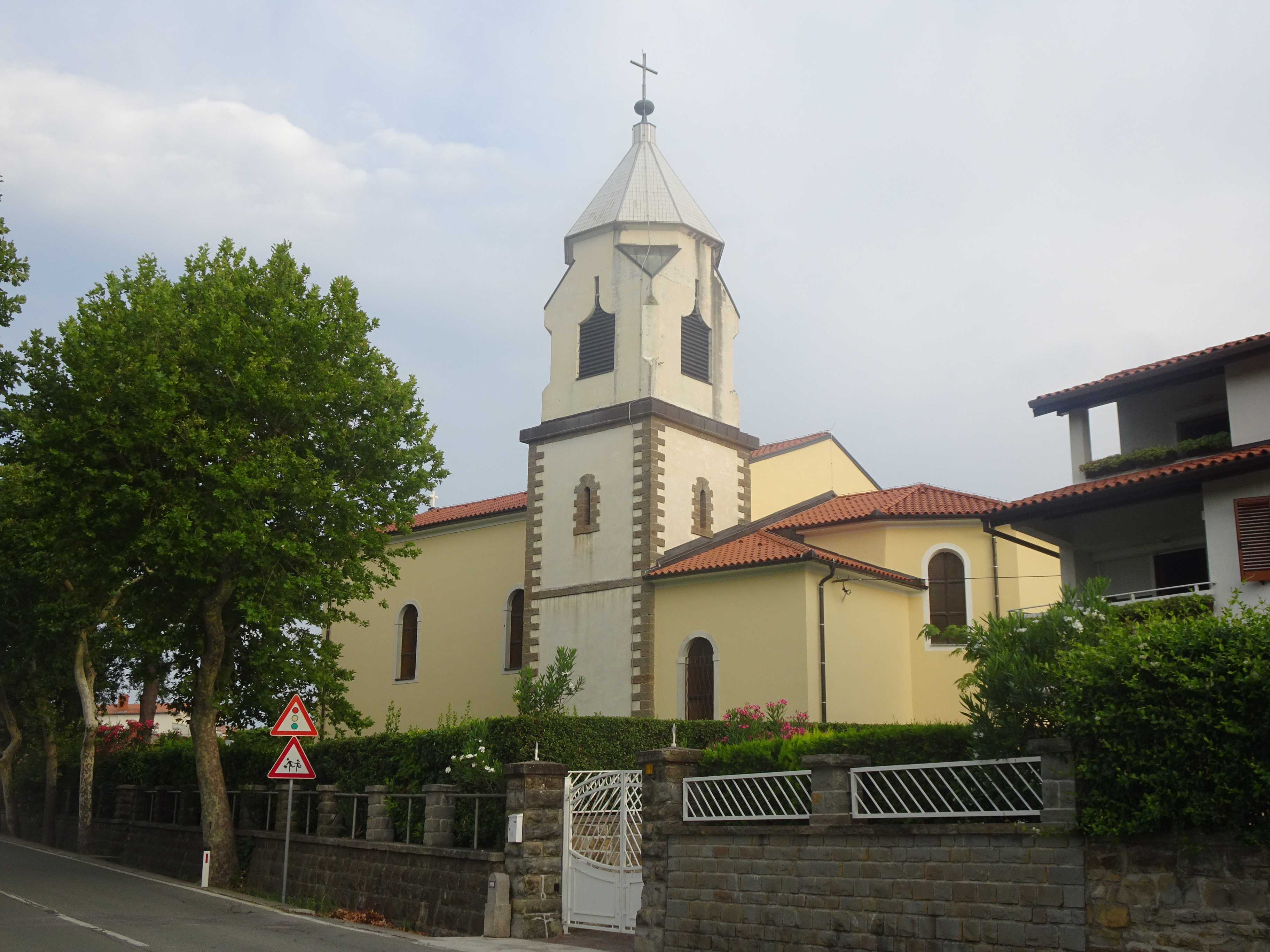 Cerkev Srca Jezusovega, Spodnje Škofije